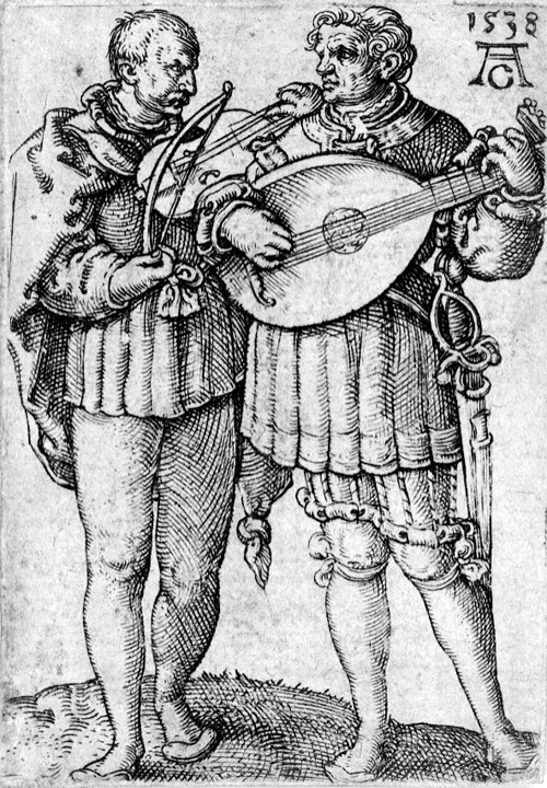 Heinrich Aldegrever: Stich aus Die kleinen Hochzeitstänzer, Serie von 8 Kupferstichen, je ca 5,4 x 3,8 cm. 1538